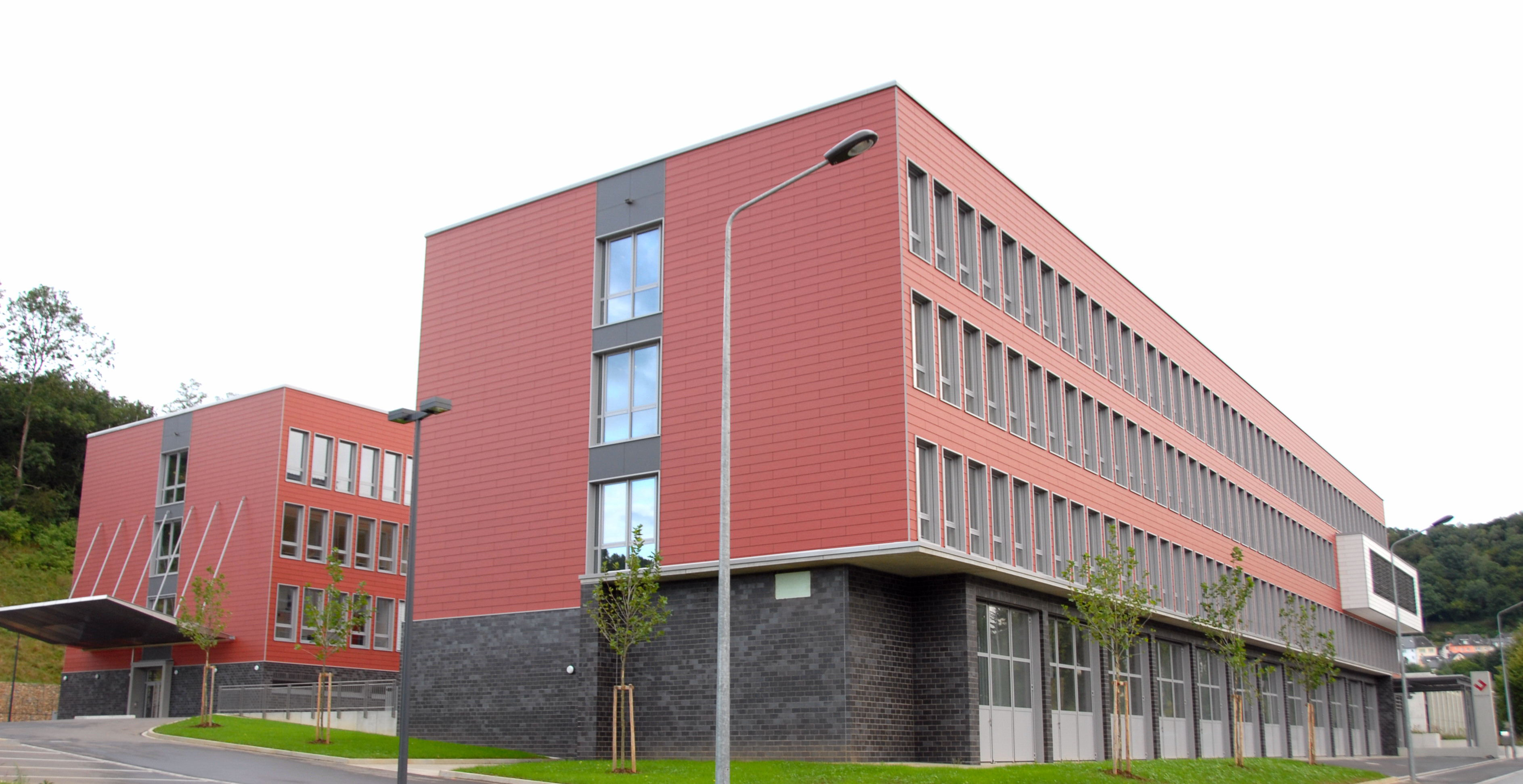 Den Uelzecht-Lycée zu Dummeldeng.